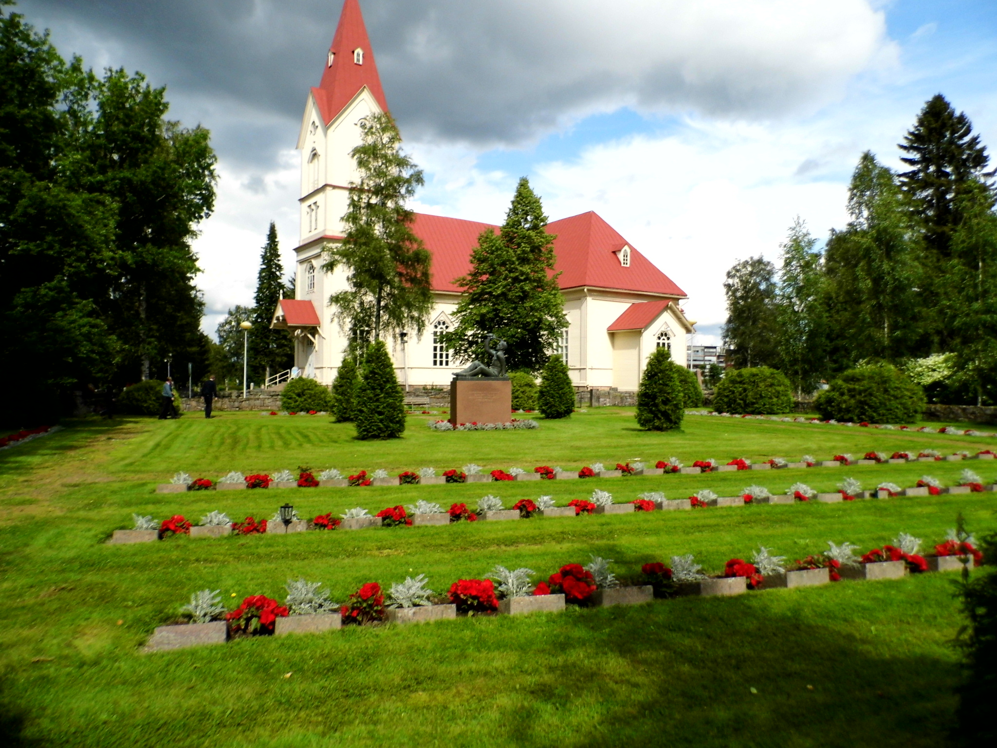 Ylivieskan kirkon sankarihaudat kesällä 2015